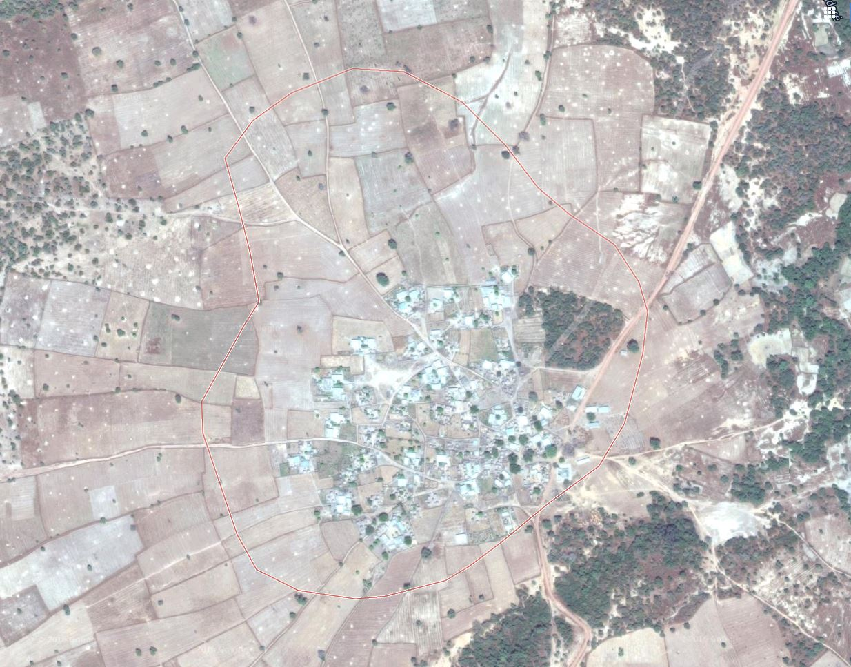 Vue satelitte de Dieylani.